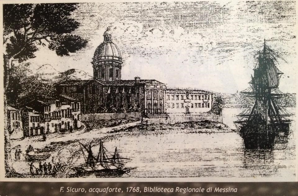 La sede dell'Archimandritato del Santissimo Salvatore dal 1543 al 1866.